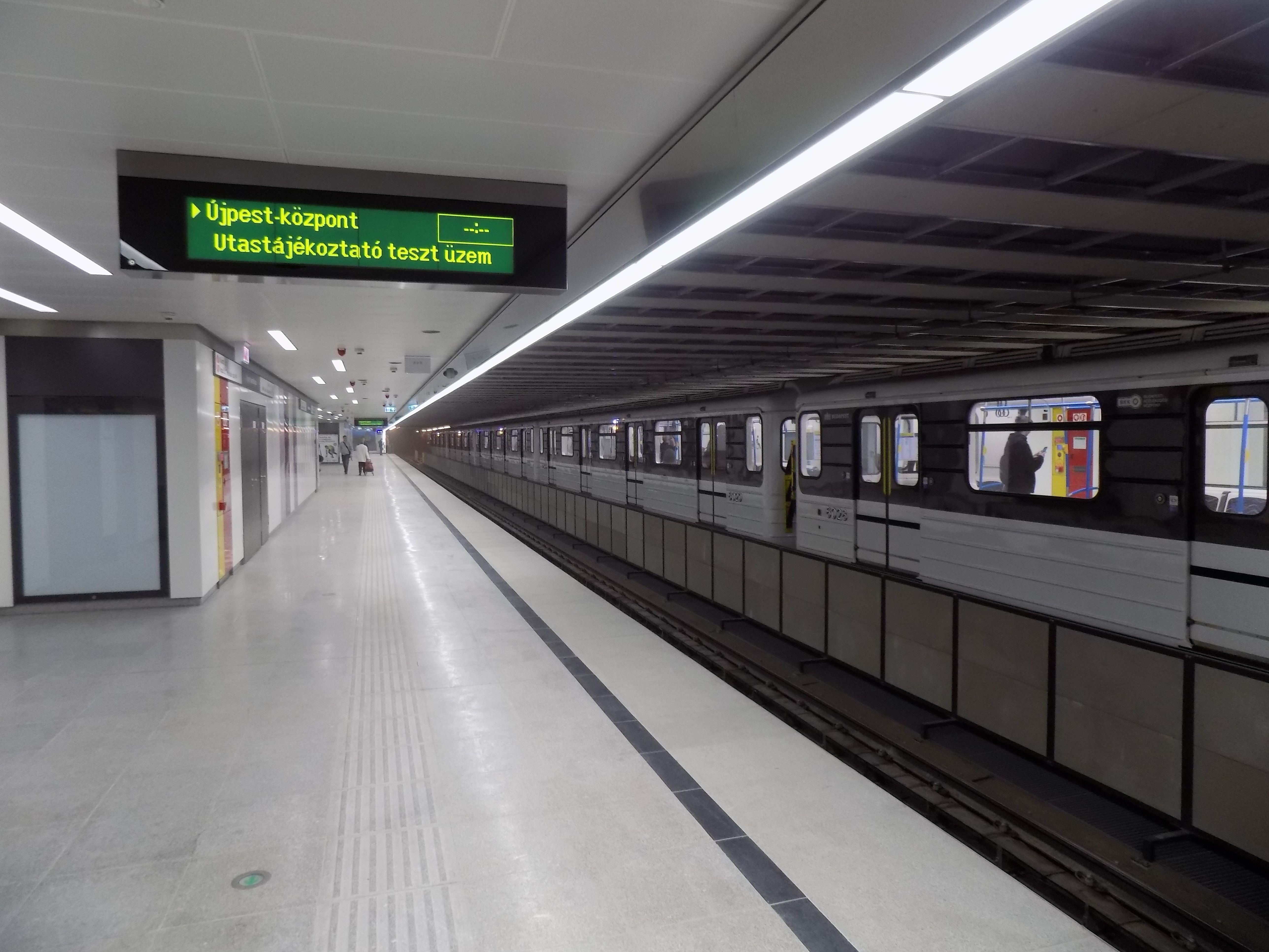 A budapesti M3-as metróvonal felújított Újpest-városkapu állomása